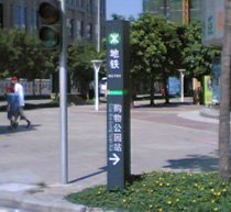 深圳地鐵指示柱